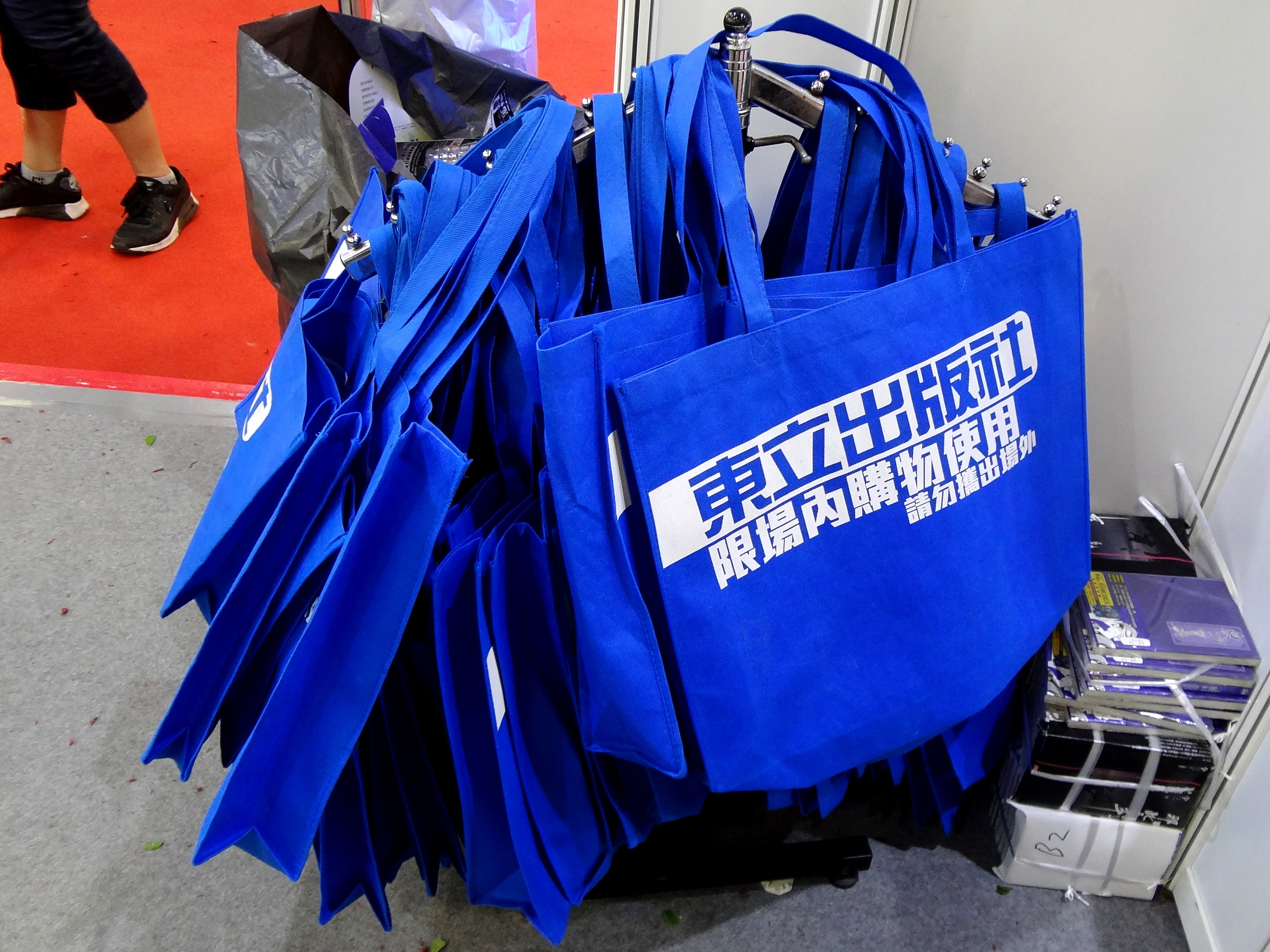 2017年（第18屆）漫畫博覽會，東立出版社攤位入口提供的專用環保購物袋。